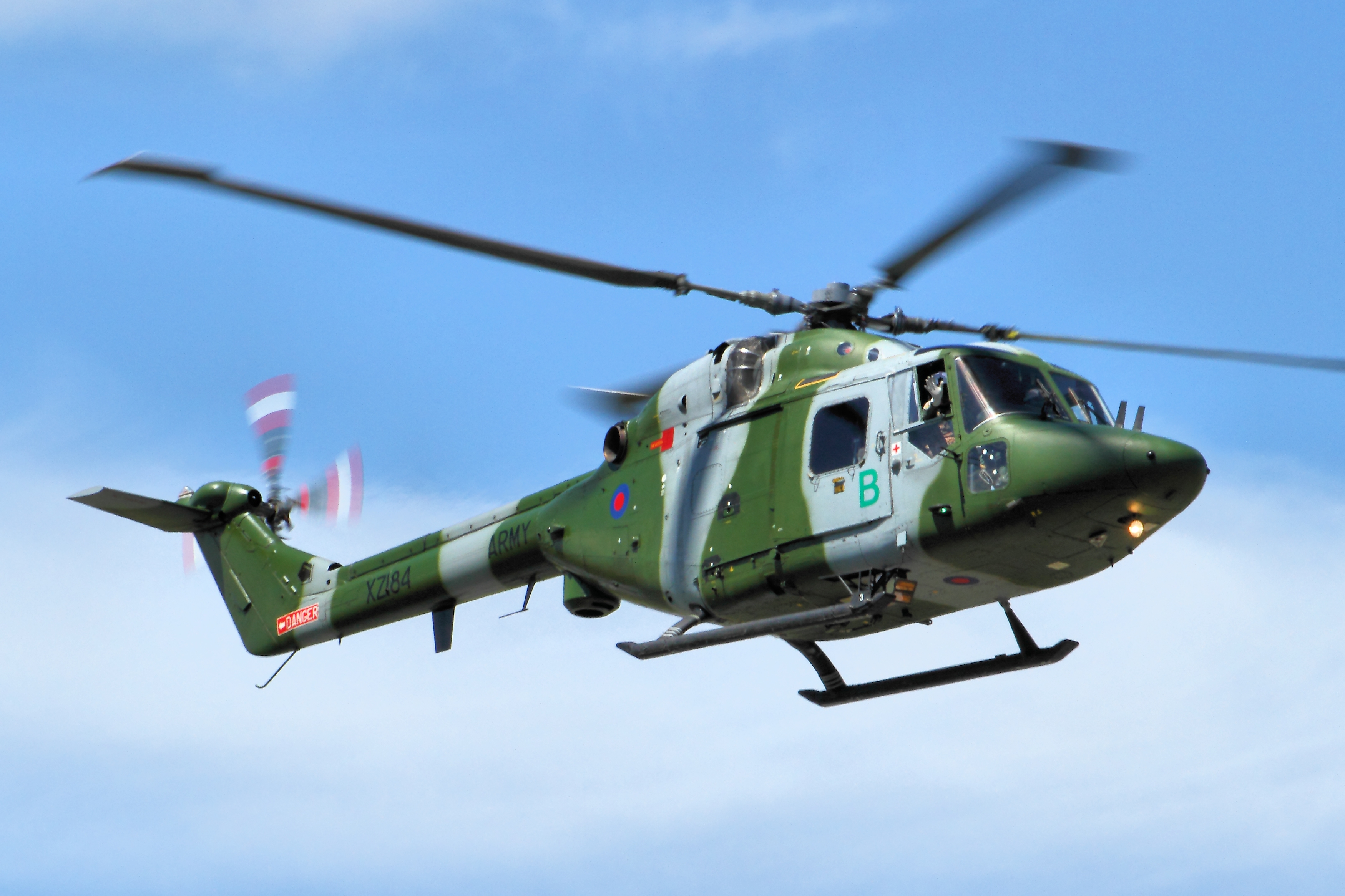 Lynx AH7 - RIAT 2014